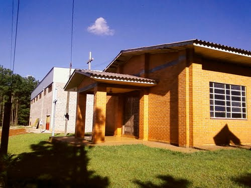 igreja Santa Catarina